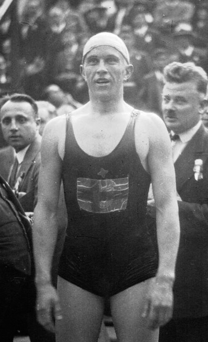 Les Tourelles : Championnats d'Europe : Reingold (Finlande, portrait à 3 m) : [photographie de presse] / Agence Meurisse